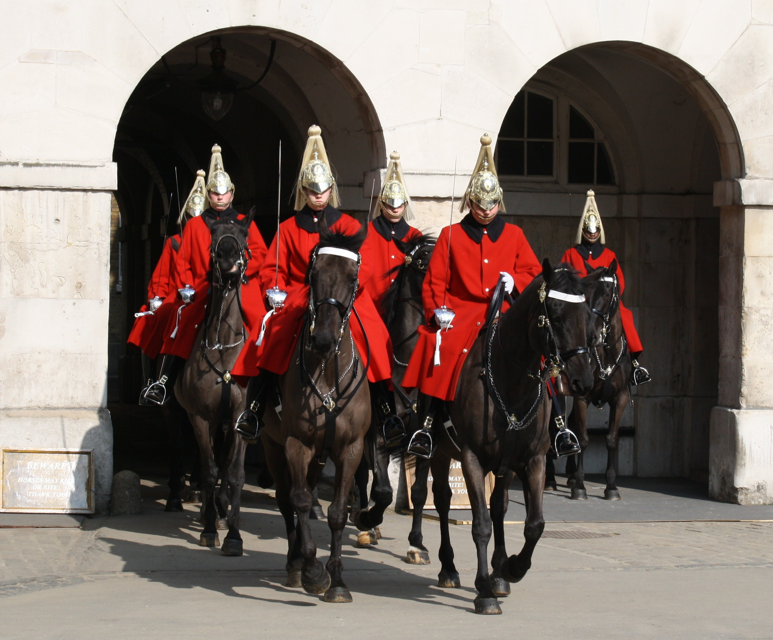 Londres - Horse Guards - Régiment des Life Guards, en tunique rouge. Horse Guards Building : relève de la Garde (changement de régiment en faction à Whitehall).